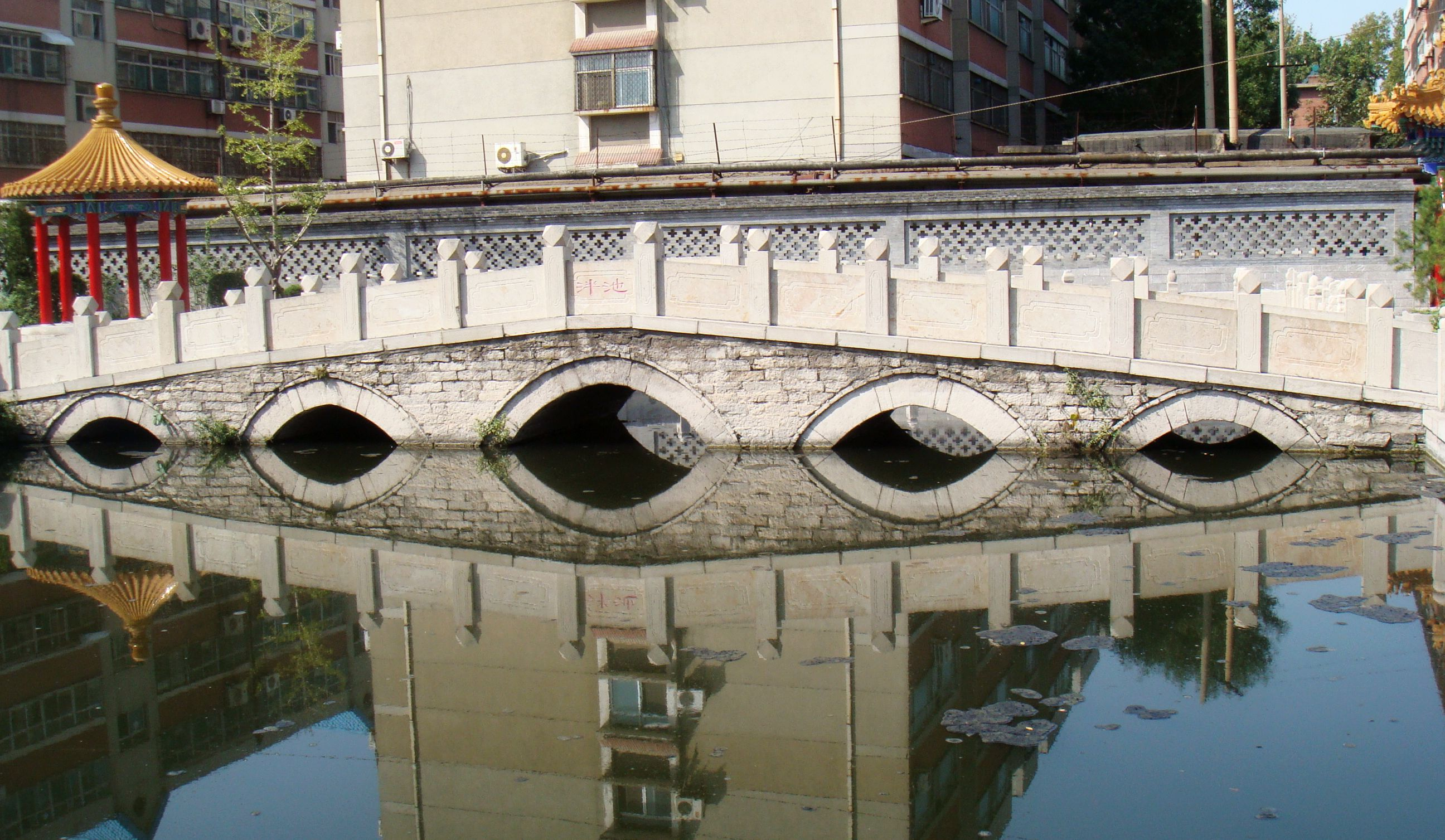 济南府学文庙，图为从东侧看泮池。